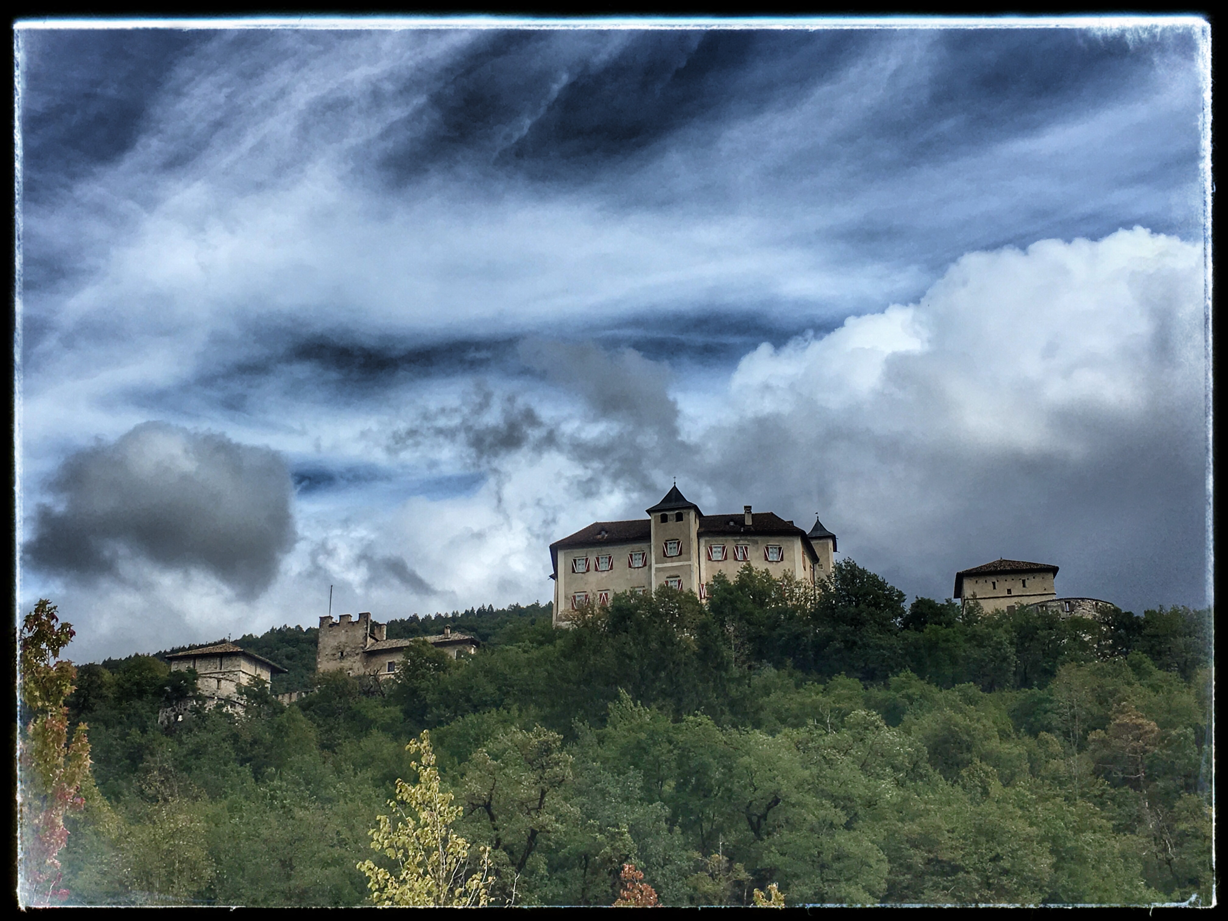 Castel Thun, Vigo di Ton (Q1048623)